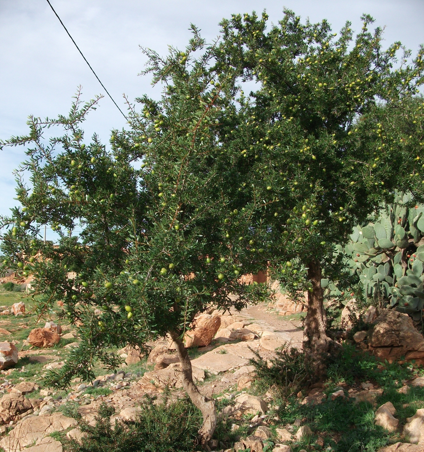 Arganbäume